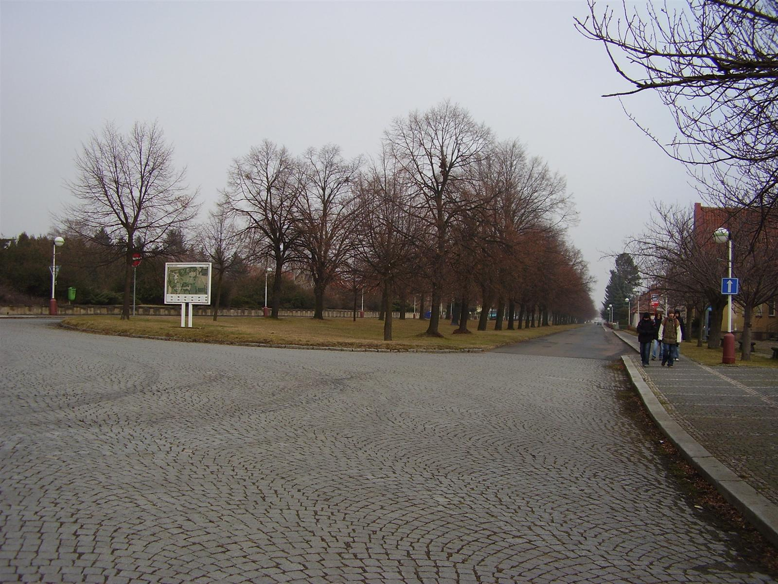 Hlavní ulice v nově postavené obci Lidice